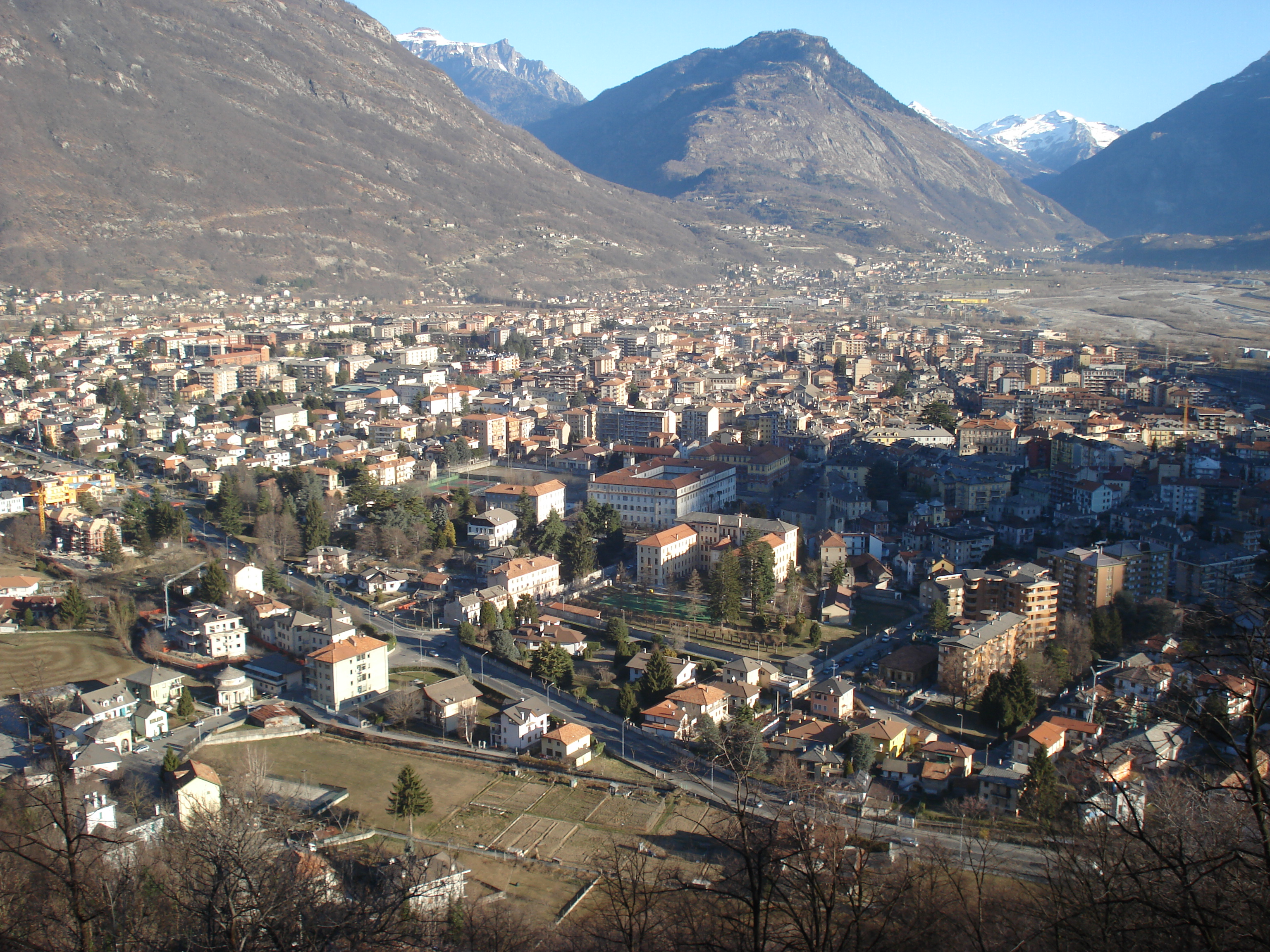 Domodossola